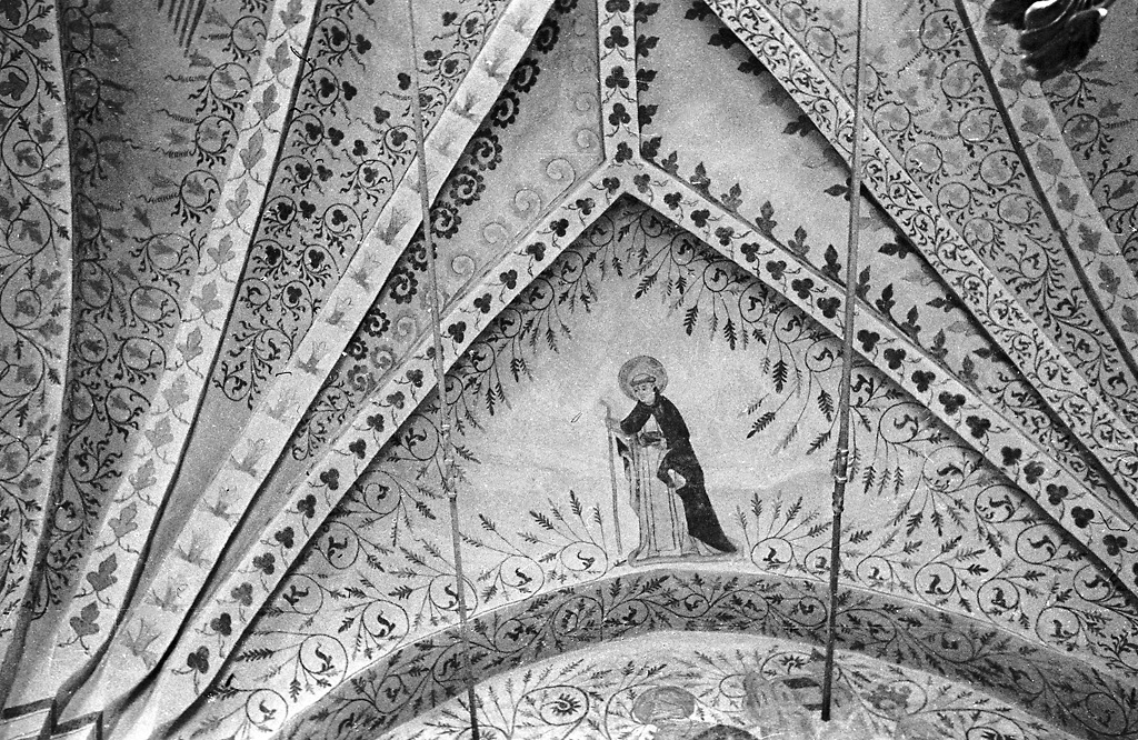 Medieval mural painting (lime paint) from 1437 in a vault in Tensta church, built in ca 1270-1290. Medeltida kalkmålning från 1437 i ett valv i Tensta kyrka, byggd omkring 1270-1290. Parish (socken): Tensta Province (landskap): Uppland Municipality (kommun): Uppsala County (län): Uppsala Photograph by: Berit Wallenberg Date: 19.08.1933 Format: Film Persistent URL: Read more about the photo database (in english)